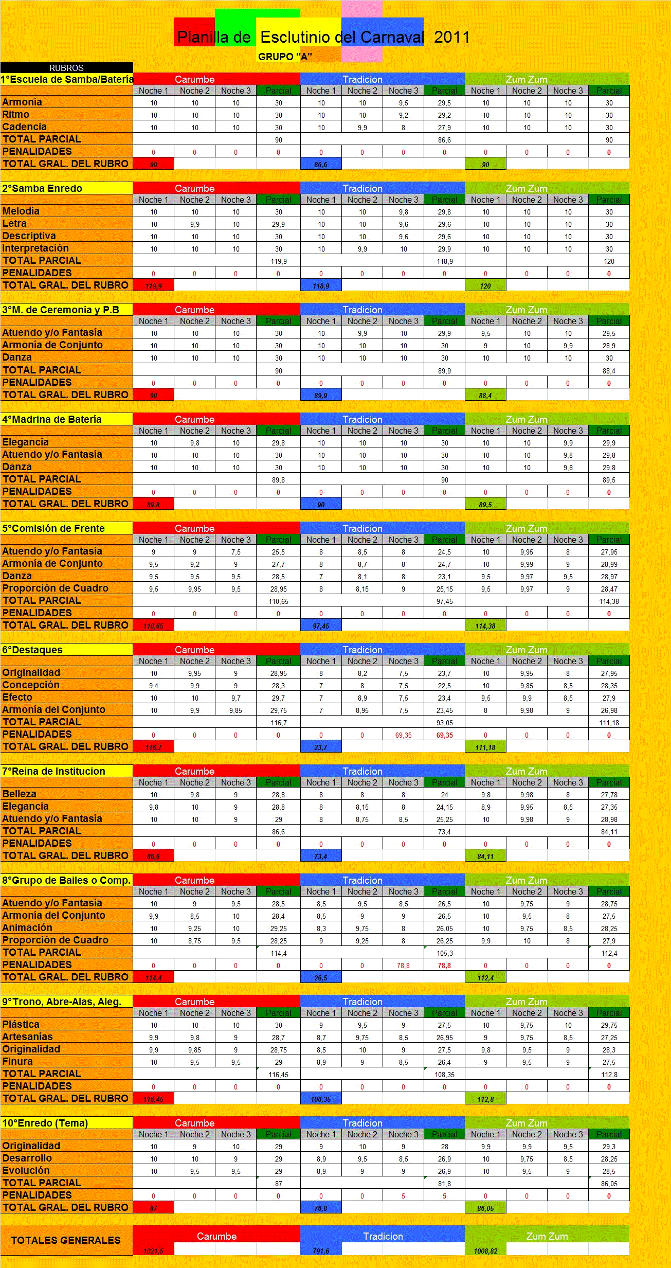 Tabela de resultados do Carnaval de Paso de Los Libres 2011.